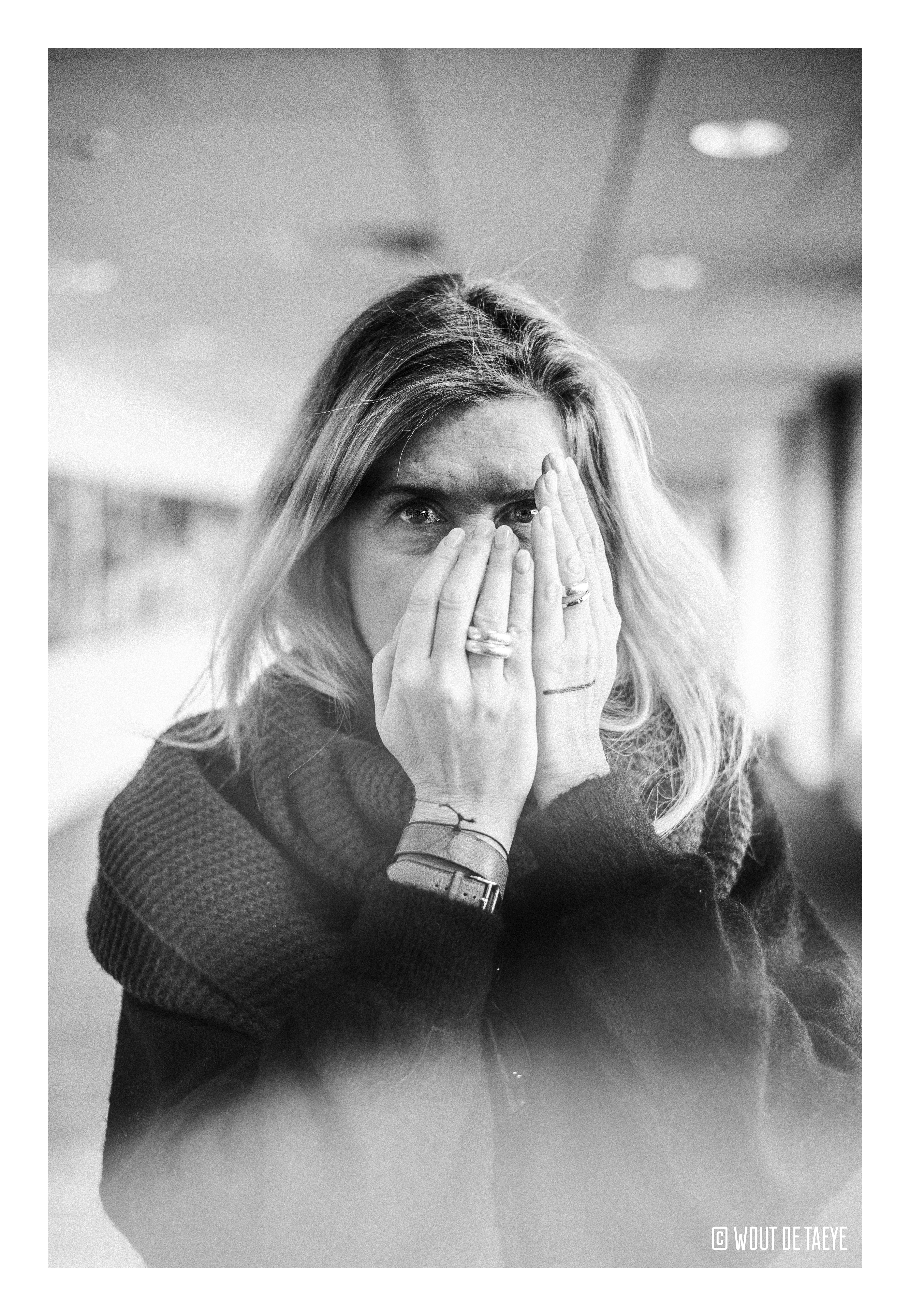 Take off the mask! © Wout De Taeye